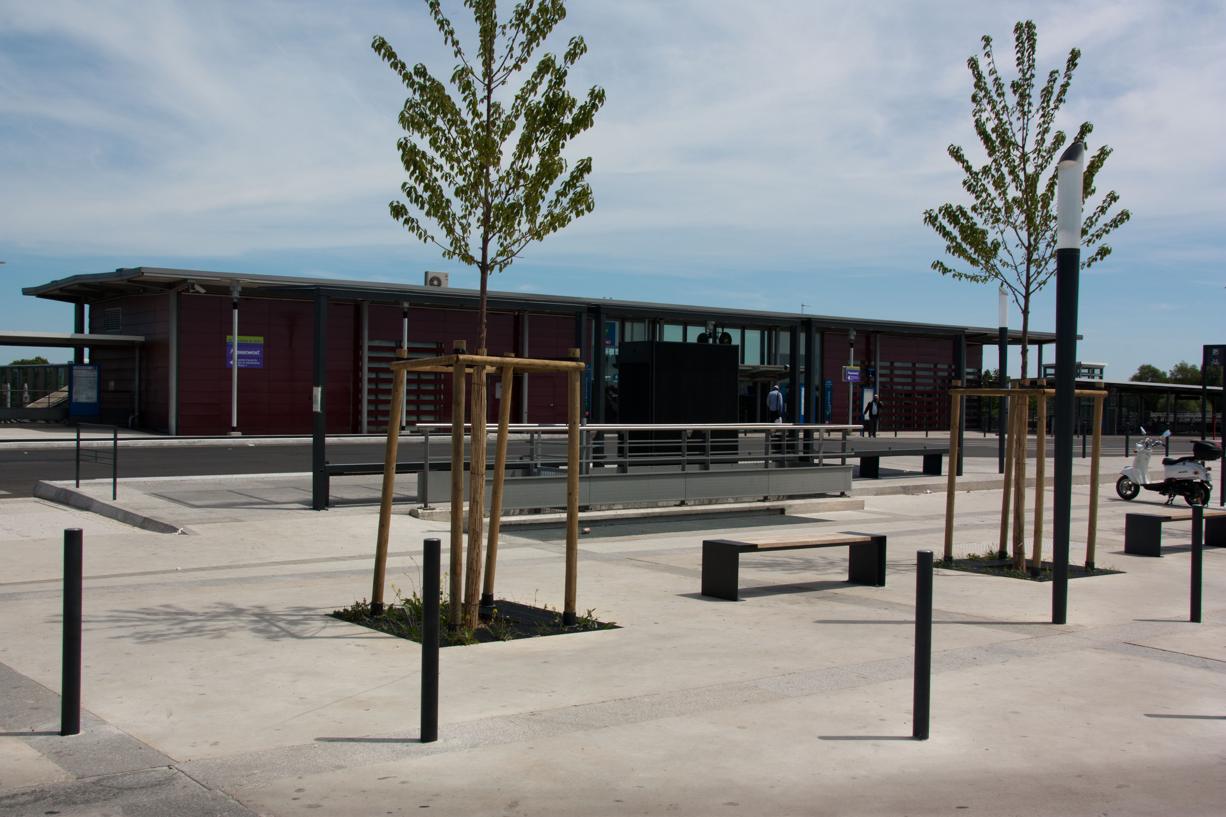 T-ZEN Ligne 1 - station de la ligne - Département de l'Essonne et de Seine-et-Marne